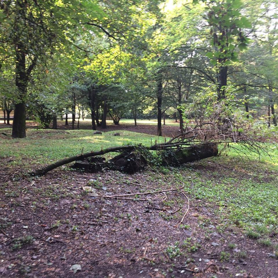 Il Parco Bosco dei Ronchi di Legnano (MI), Italia